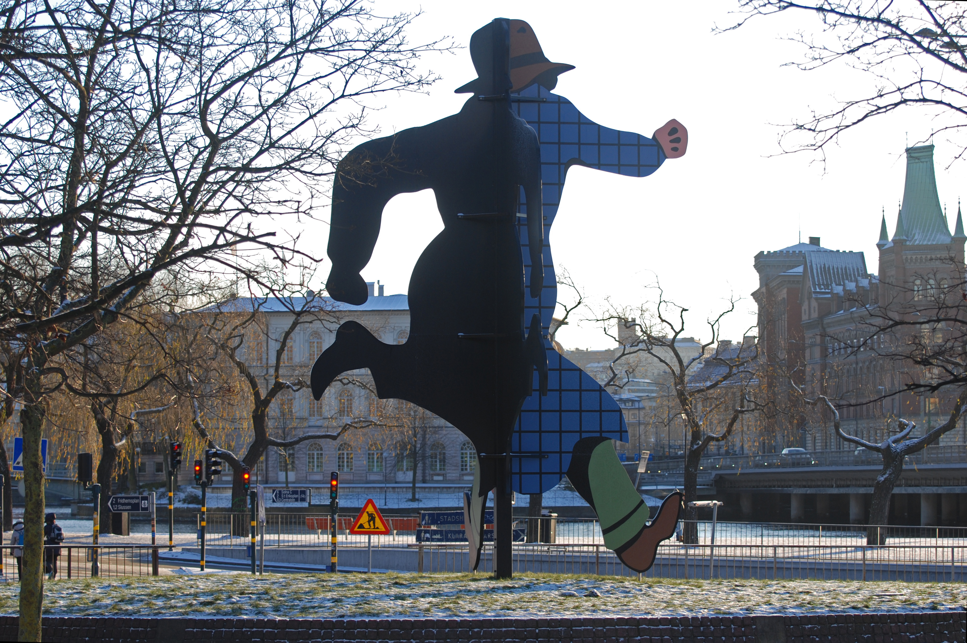 Who is Mr Walker?, staty av Jan Håfström i Järnvägsparken, Stockholm